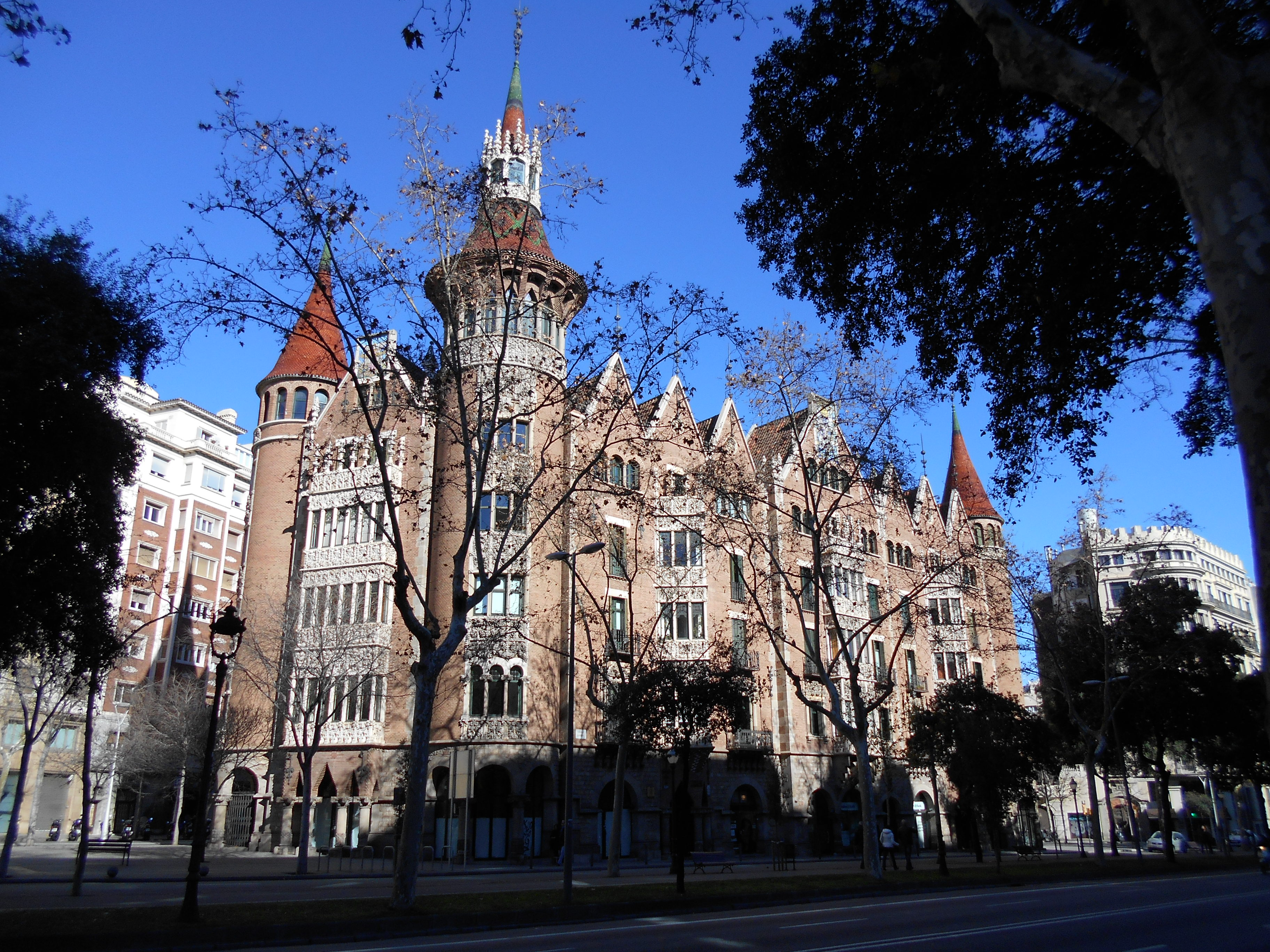 Casa de les Punxes.